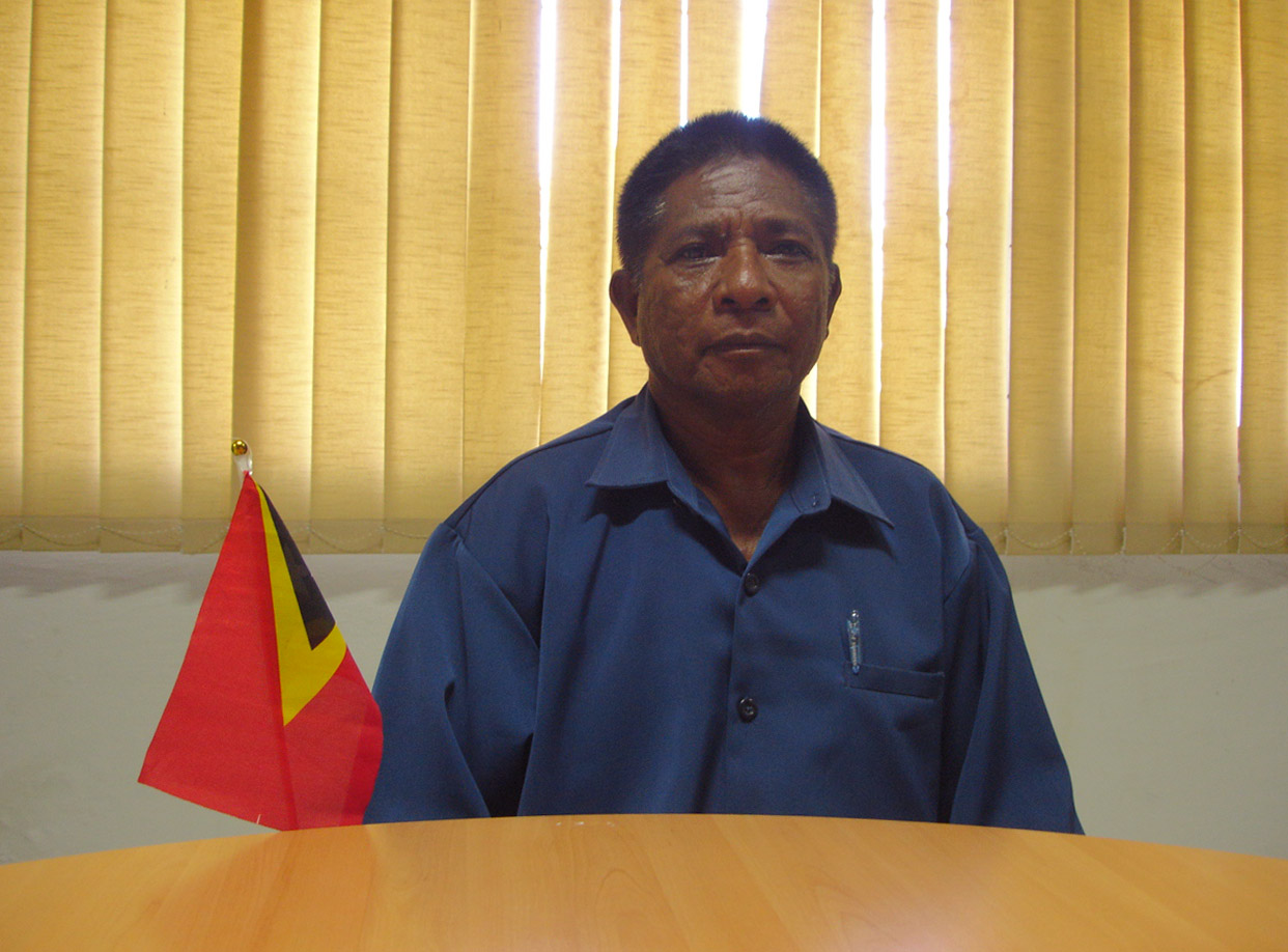 Alfredo da Costa, Administrator des Subdistrikts Cailaco